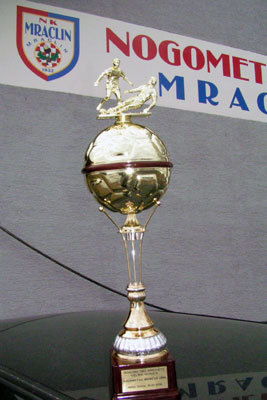 Nagrada za najbolju nogometnu momčad Velike Gorice 2005.